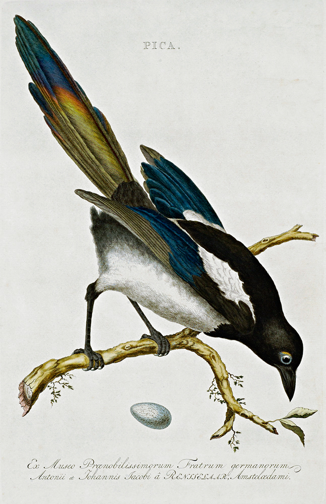 Ekster uit de Nederlandsche vogelen beschreven door Cornelius Nozeman, en uitgegeven door Jan Christiaan Sepp, boekverkoper, 1770.